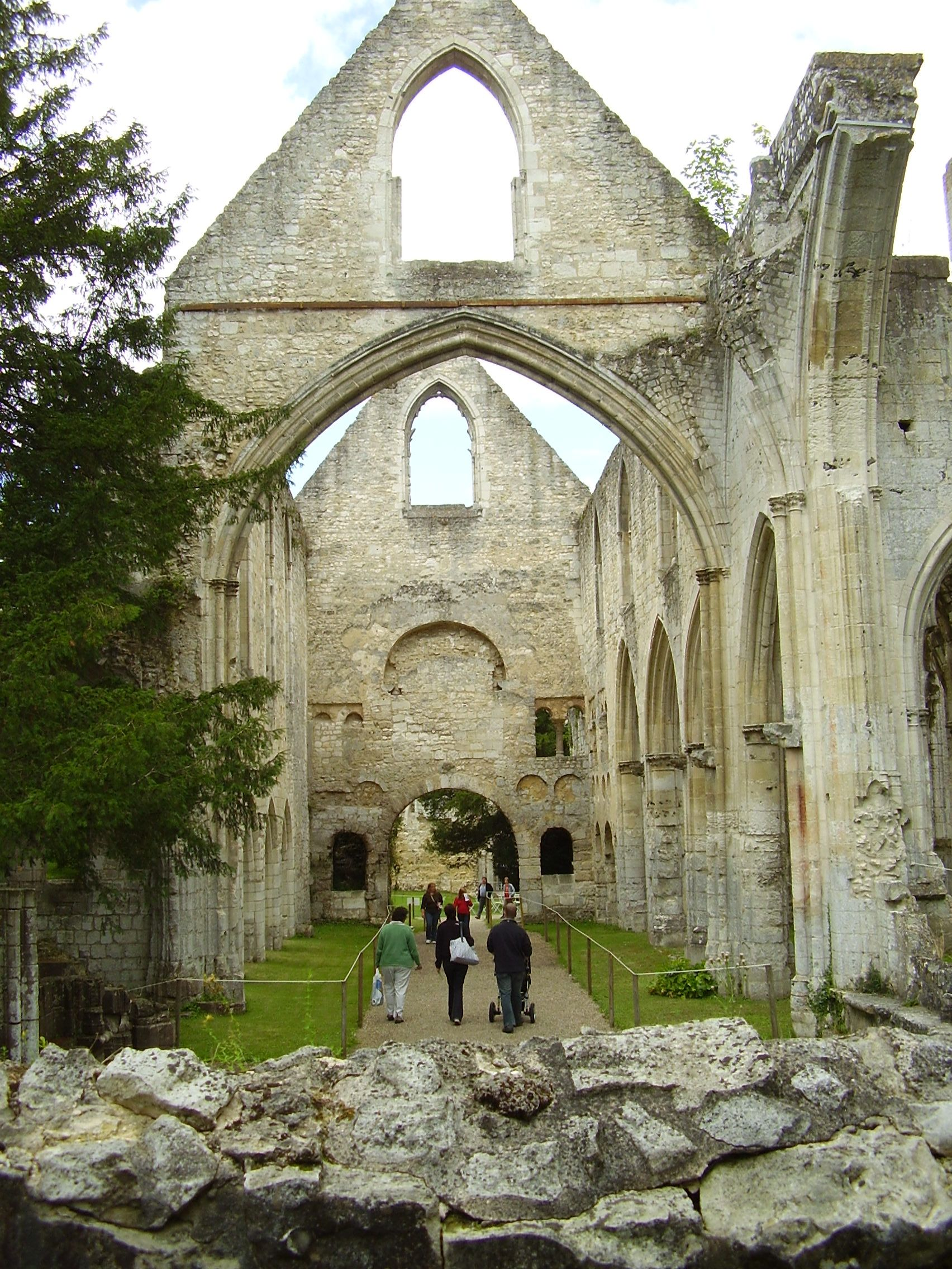 Abbaye de Jumièges, the most beautiful ruins in France